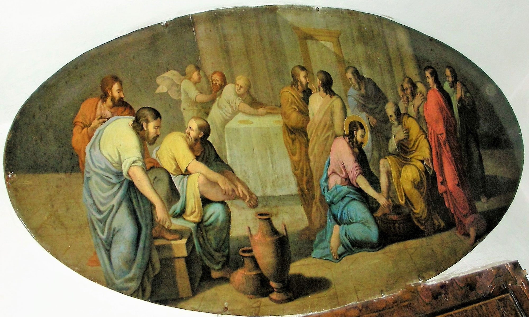 Spălarea picioarelor - icoană din Biserica Sfântului Nicolae din Șcheii Brașovului